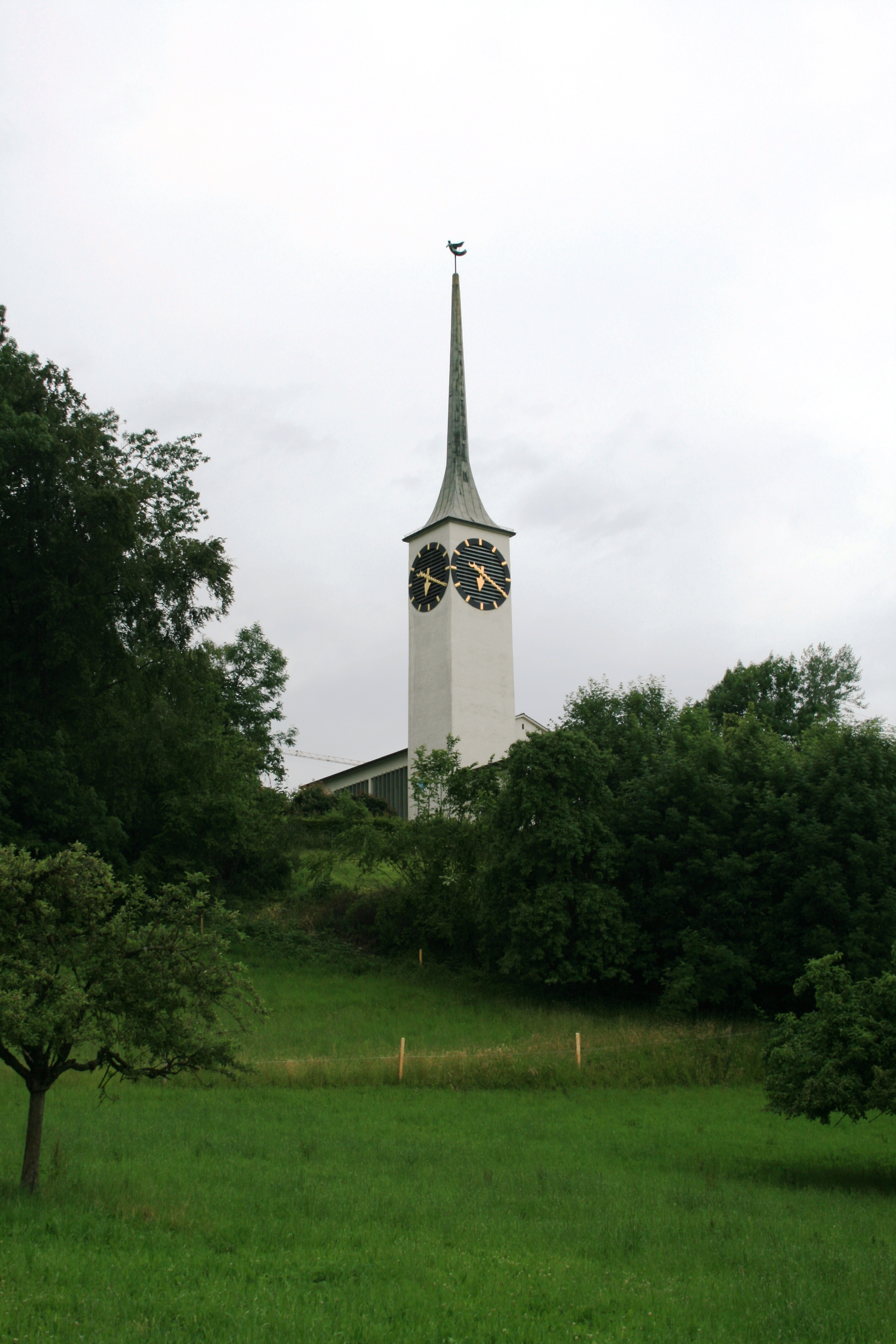 Ref. Kirche, Beinwil a. S., Schweiz. Architekt: Armin Meili (1892-1981).